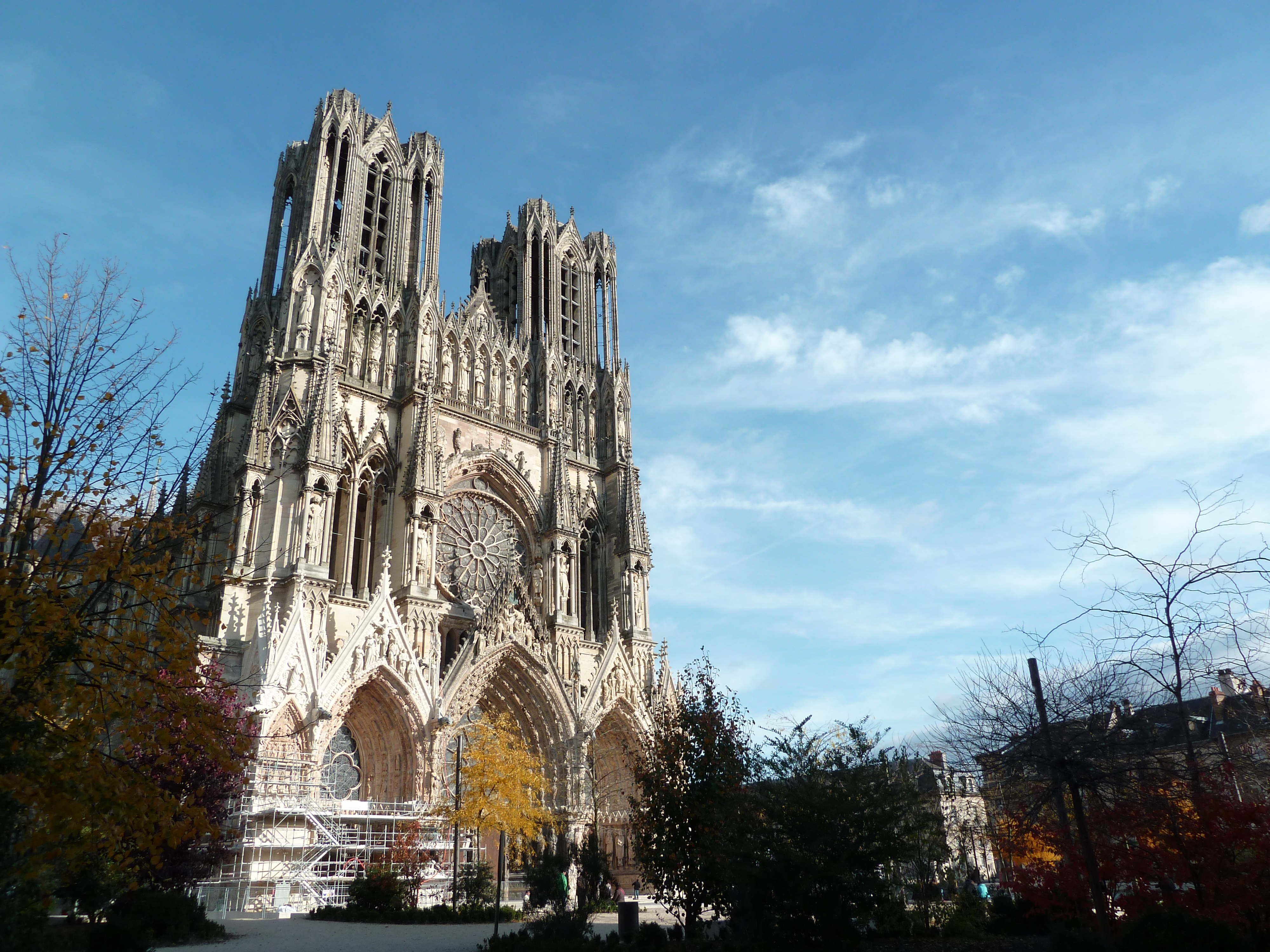 Angle de prise de vue original, façade de la cathédrale ensoleillée et ciel dégagé avec de légers nuages.